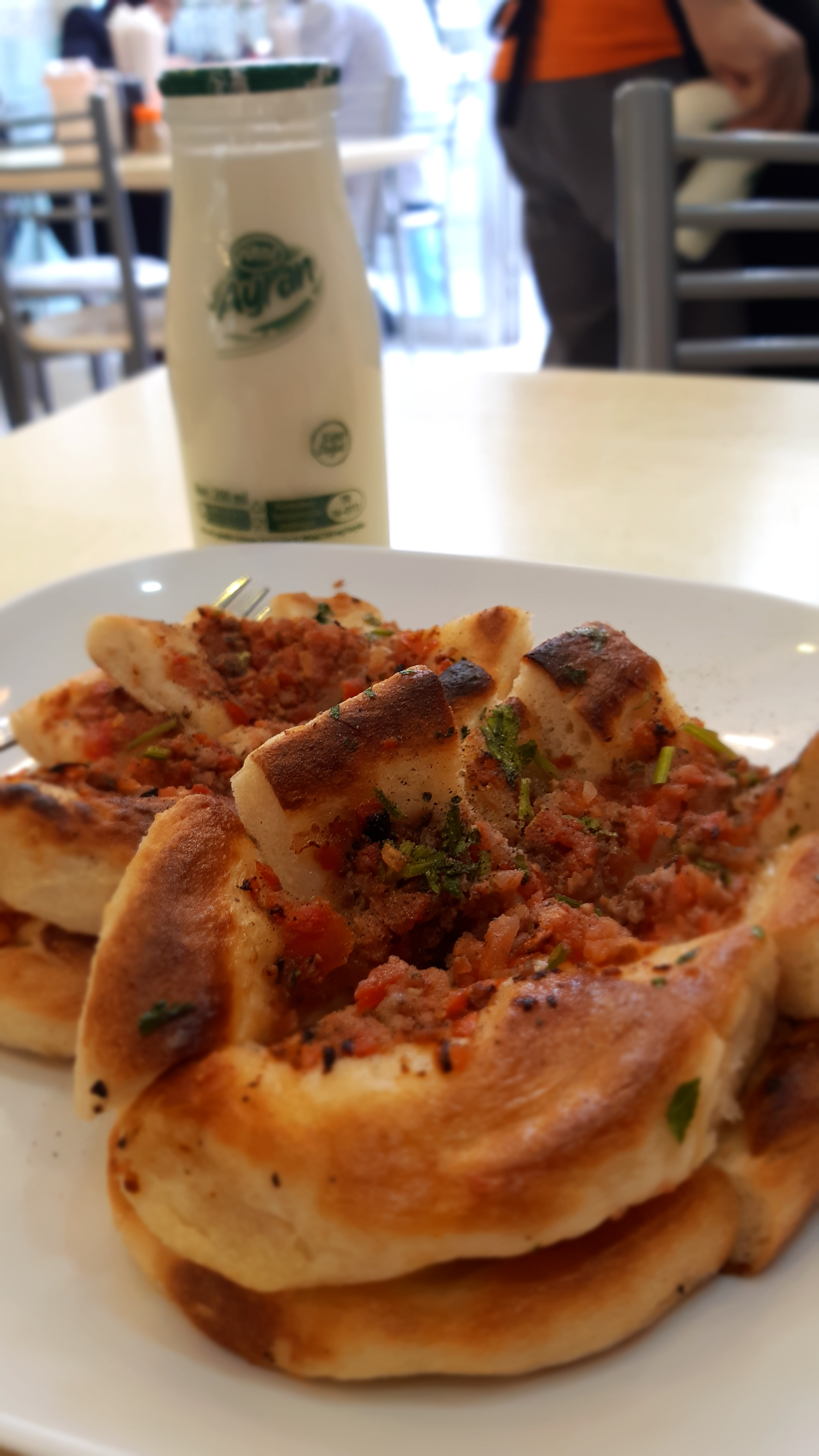 Meşhur Eyüpsultan güveci